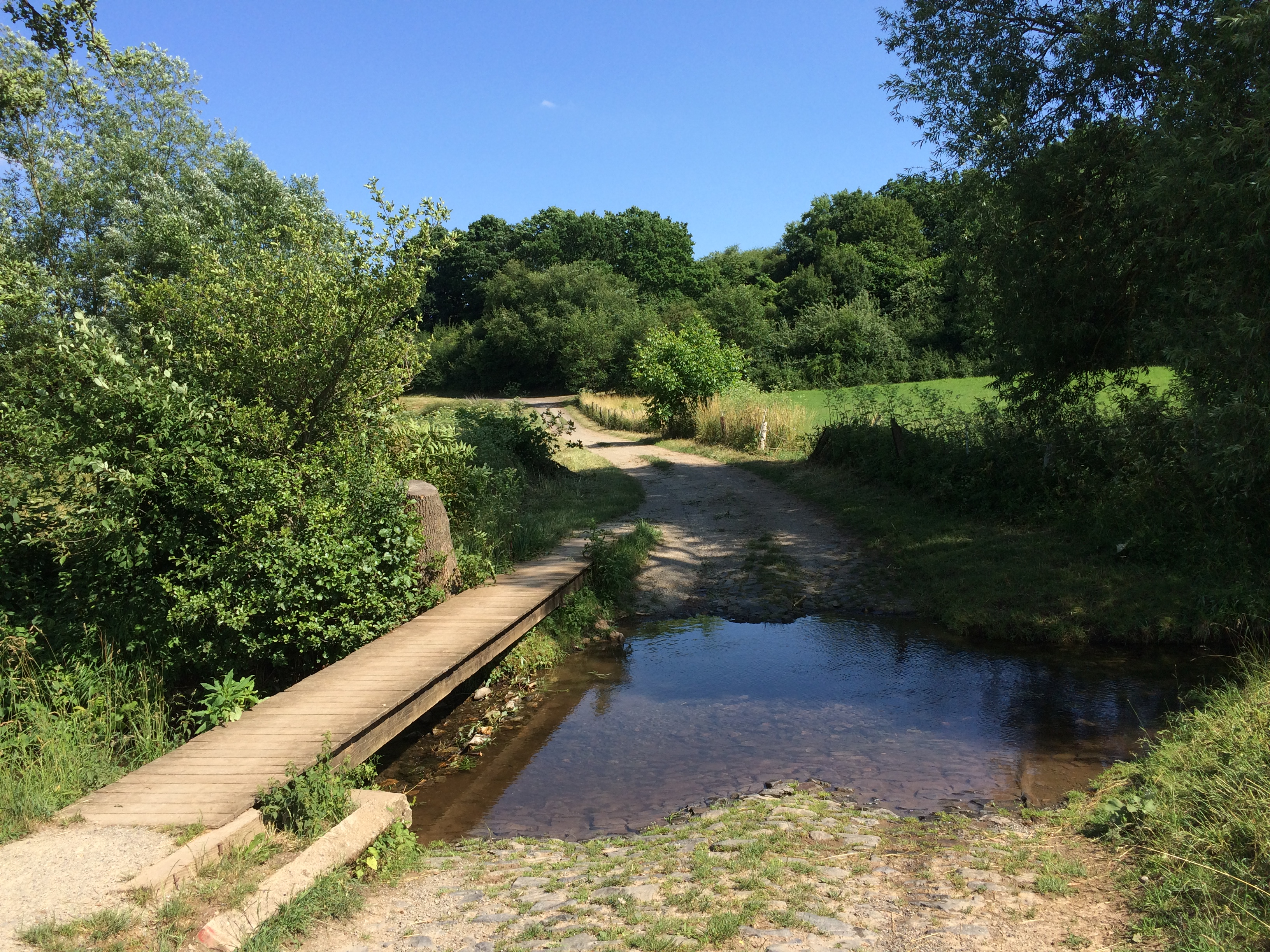 Furt über die Ahne zwischen Weimar und Heckershausen (Gemeinde Ahnatal)